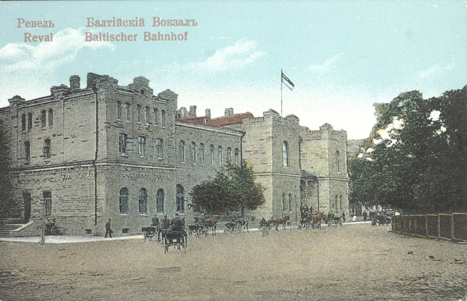 Baltischer Bahnhof postkaart